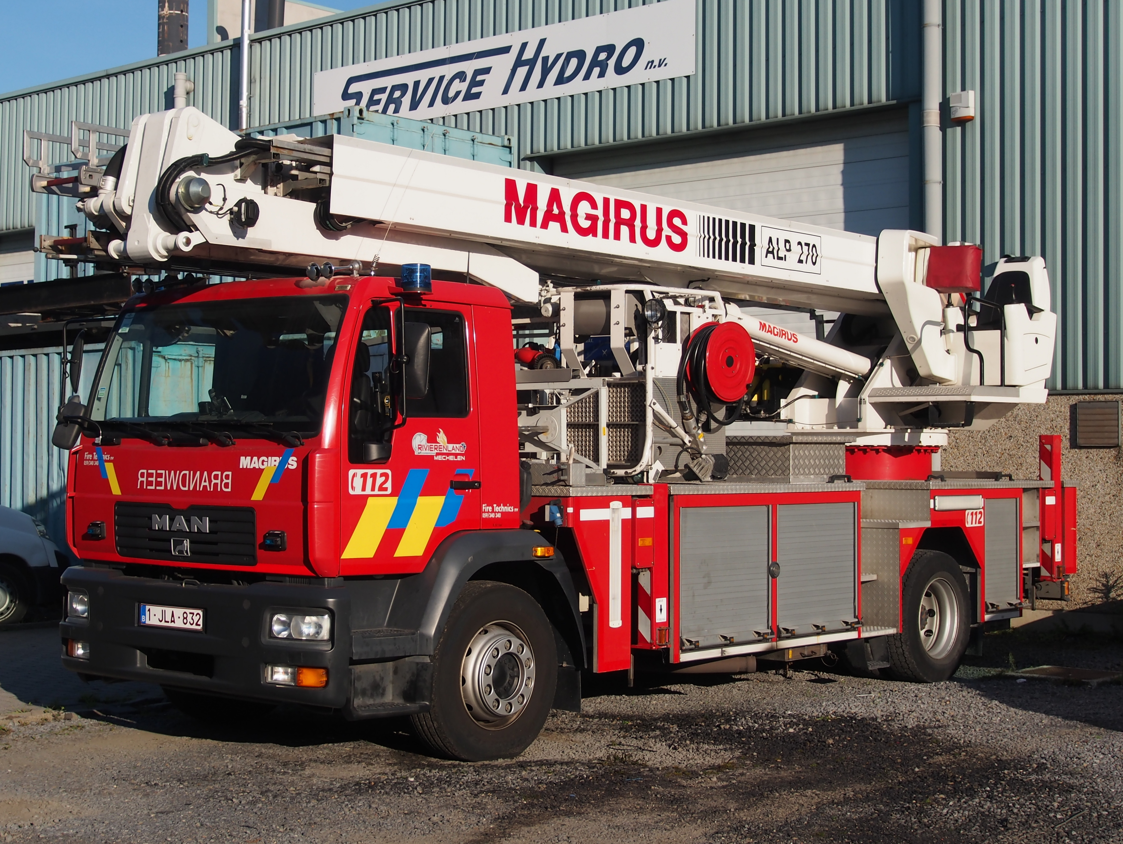 Brandweerwagen gefotografeerd in Antwerpen.